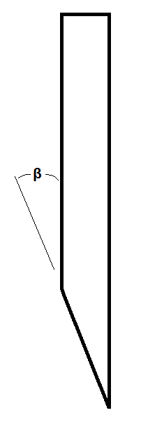 Diagramm Messerfasenwinkel